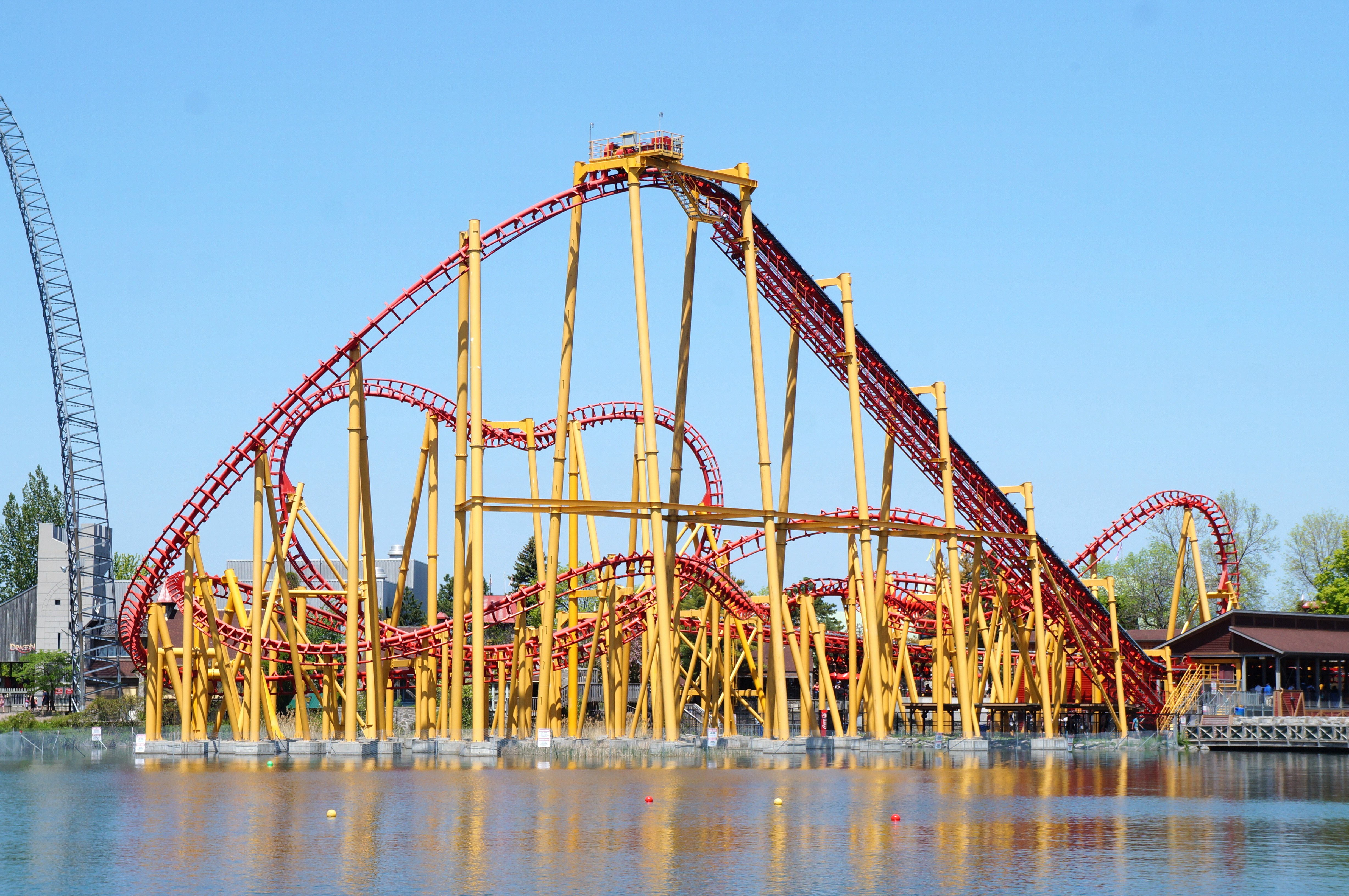 Ednör – L'Attaque